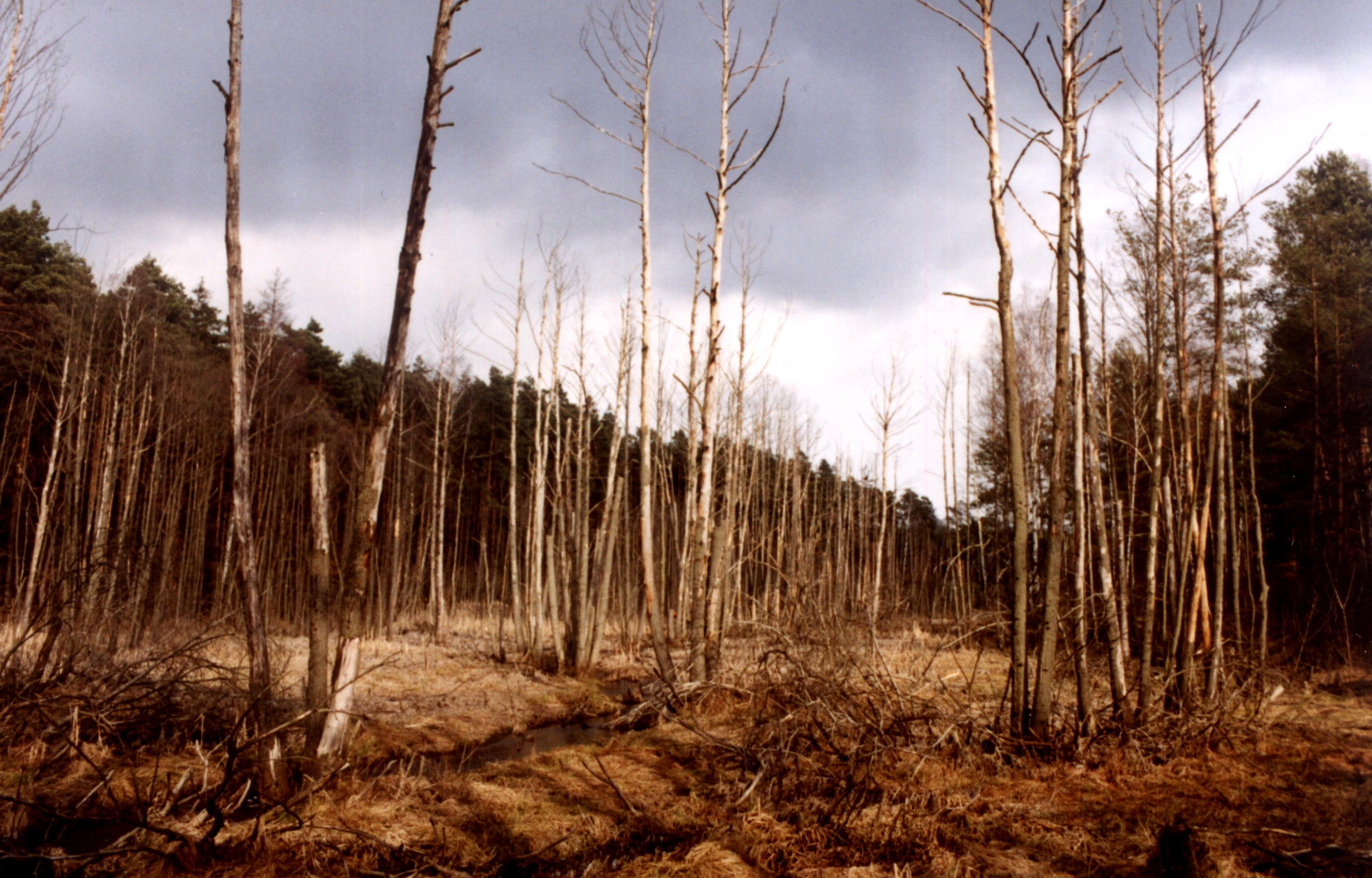 Martwe drzewa w gminie Boronów, uroczysko Makowiec, powstały w wyniku działalności bobrów. Wcześniej widoczne na zdjęciu tereny były zalane, w wyniku czego drzewa obumarły